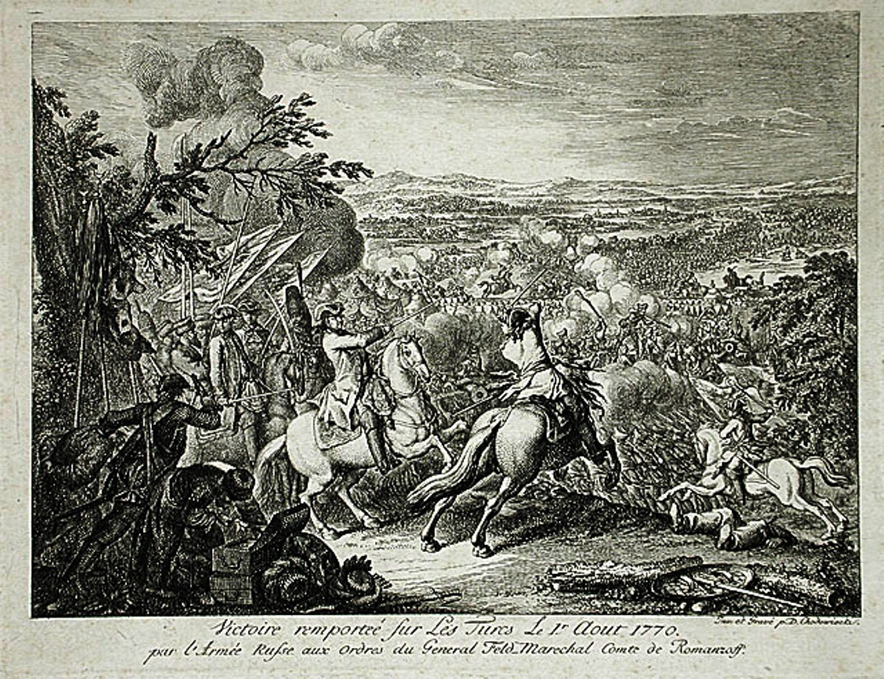 Romanzoff's Sieg über die Türken den 1. August 1770 am Kahul